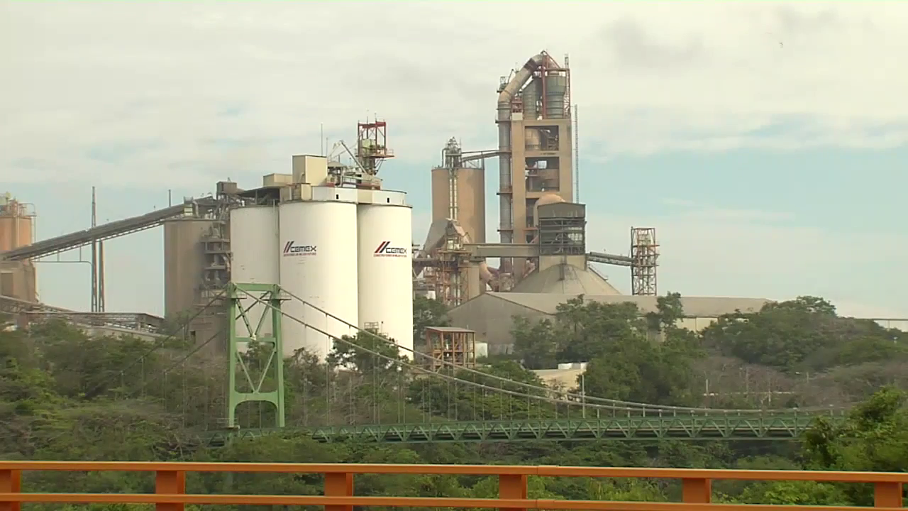 Cemex Dominicana